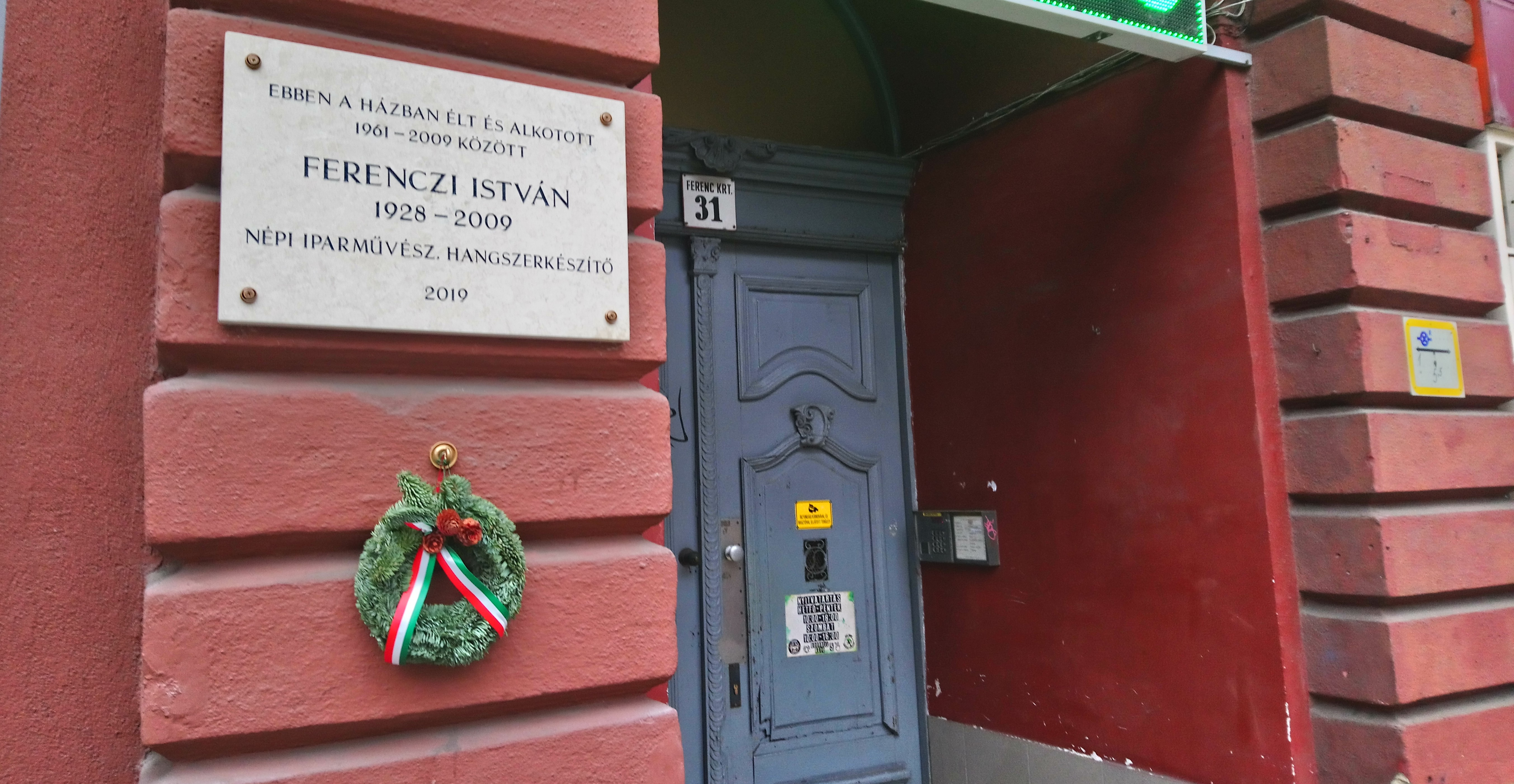 Ferenczi István emléktáblája Ferencvárosban, a Budapest, IX. kerület , Ferenc krt. 31. számú ház falán